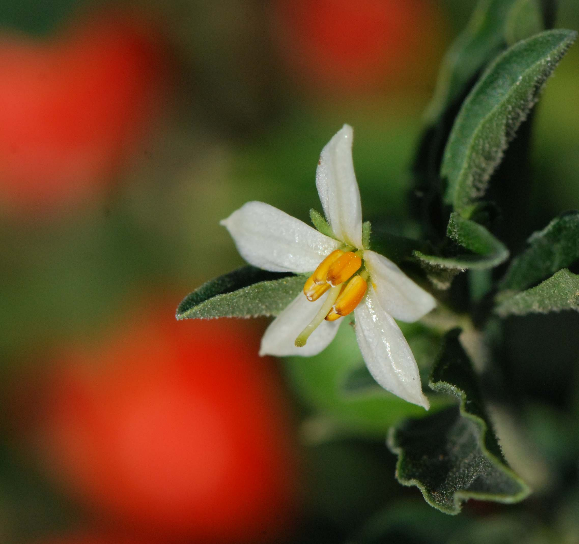 Solanum pseudocapsicum, pommier d'amour, fleur